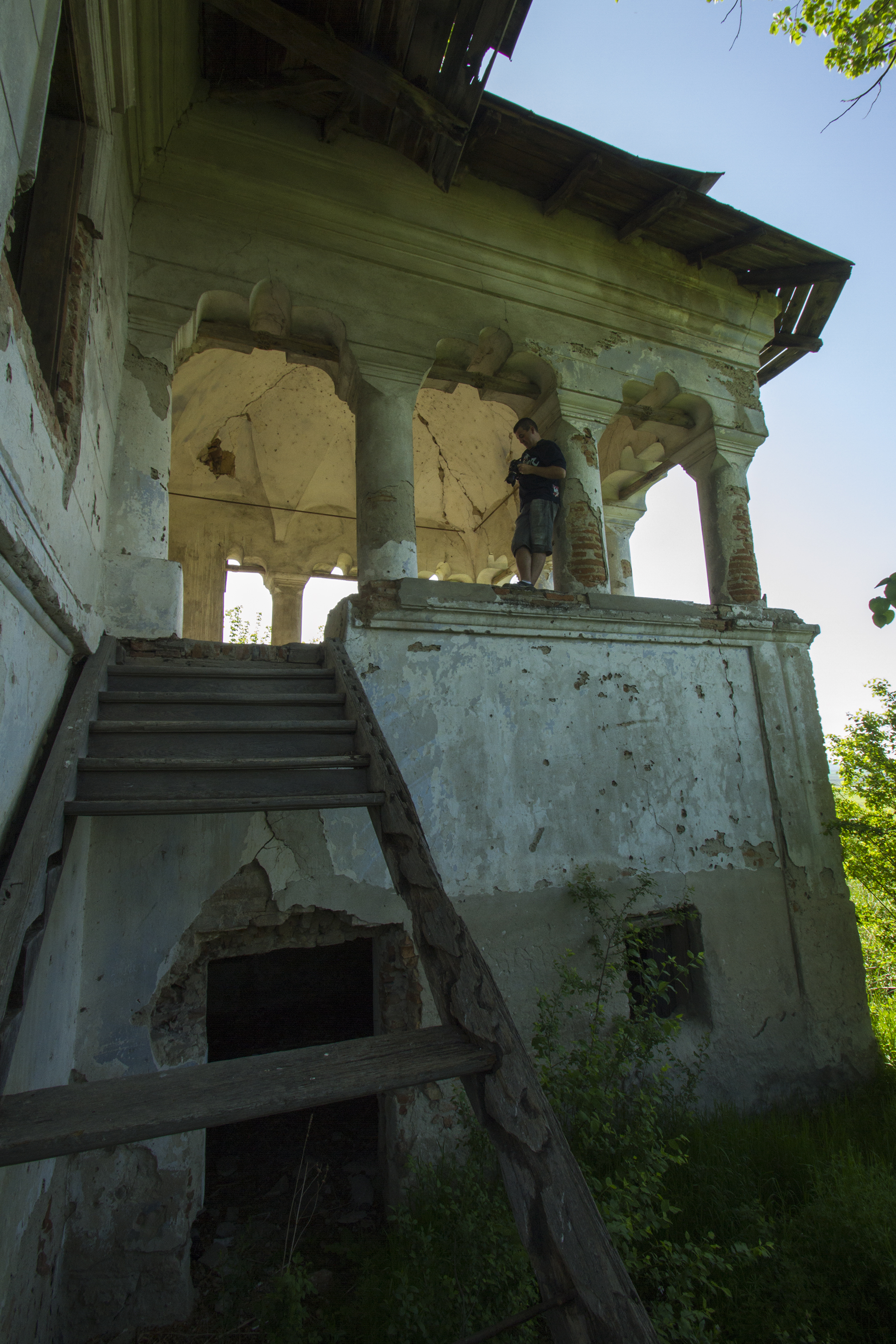 Casa Coțofenilor 01